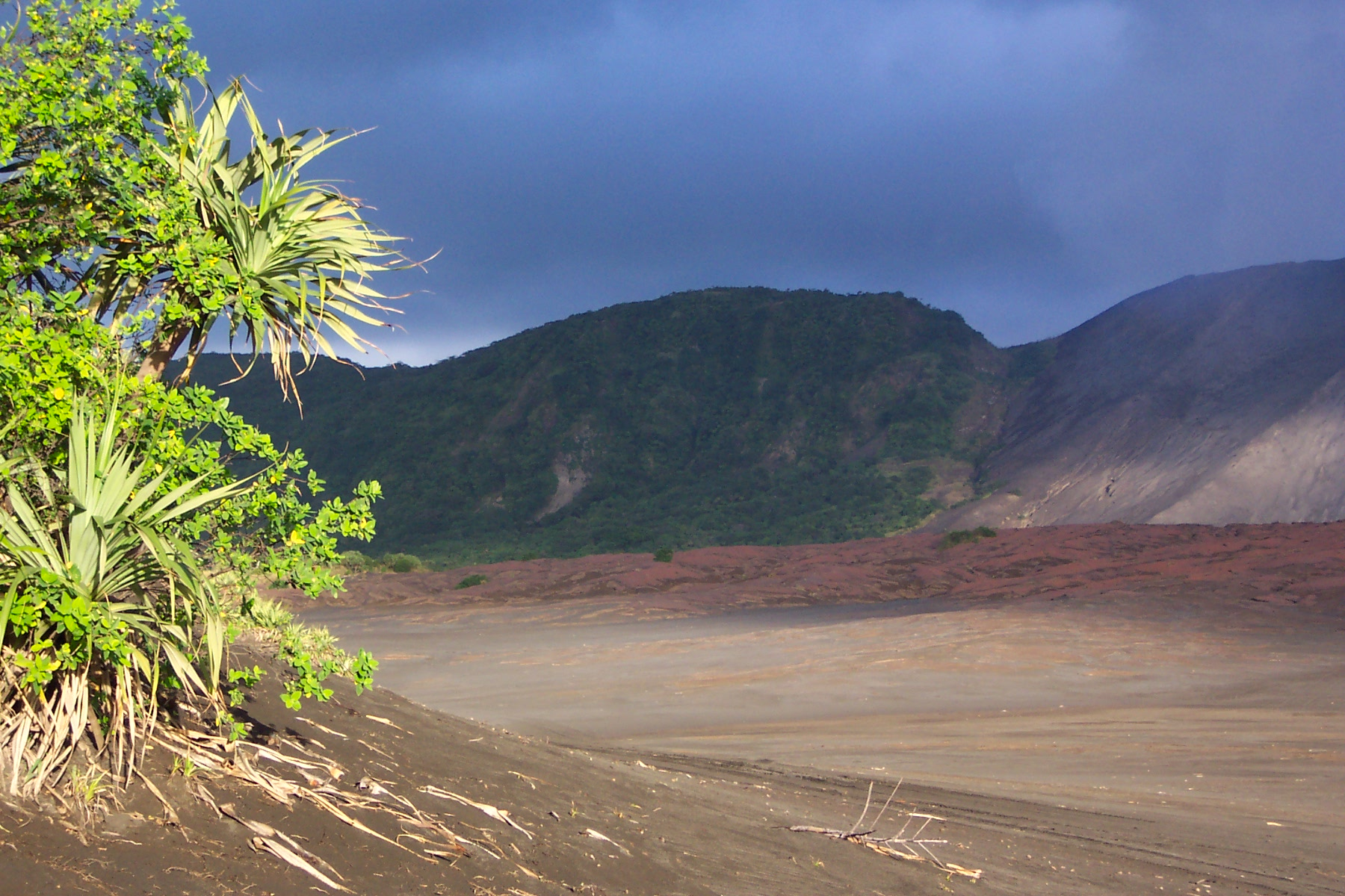 Vanuatu le volcan Yasur sur l'île Tanna la plaine de cendres (photo personnelle - voyage touristique)